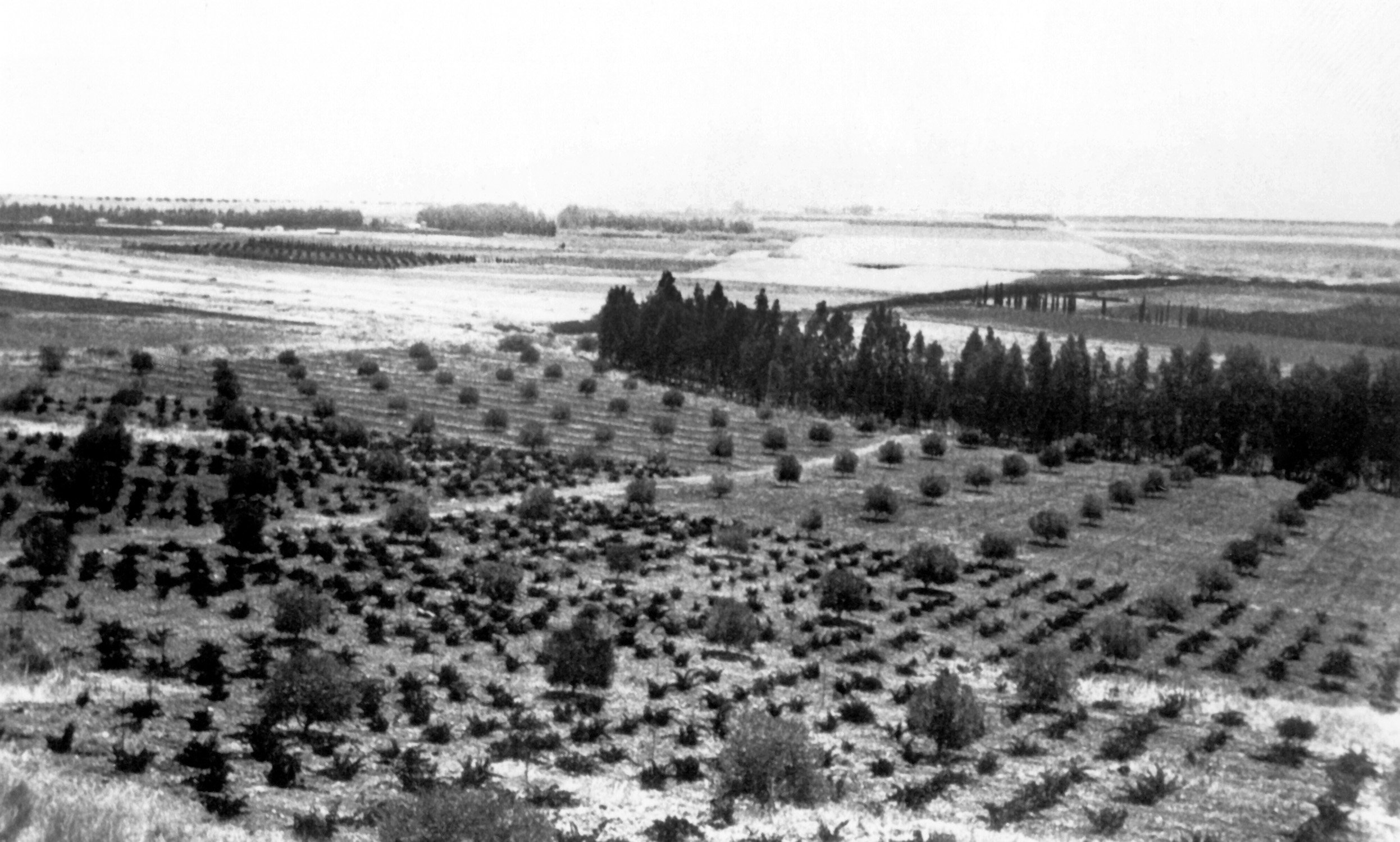 ביתניה תחתית היא חווה חקלאית שנוסדה ב-1913 על ידי יק"א, ממערב לנהר הירדן ומדרום לחוות כנרת ליד דגניה א. המקום הוא אתר מורשת. חוות ביתניה